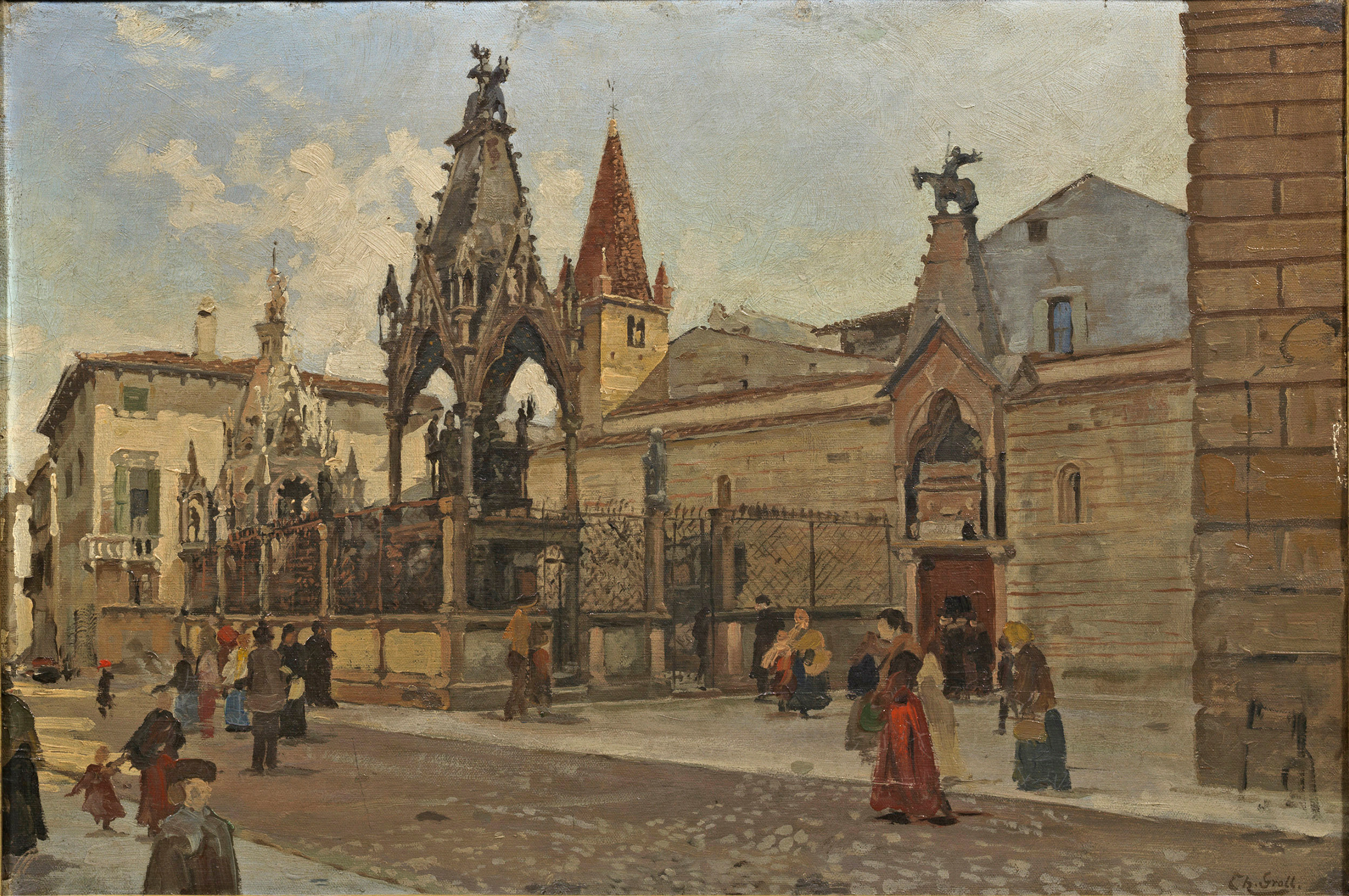 Ansicht von Verona mit Blick auf die Scaliger-Grabmäler. Öl auf Leinwand, rechts unten signiert, 39 cm x 57,5 cm